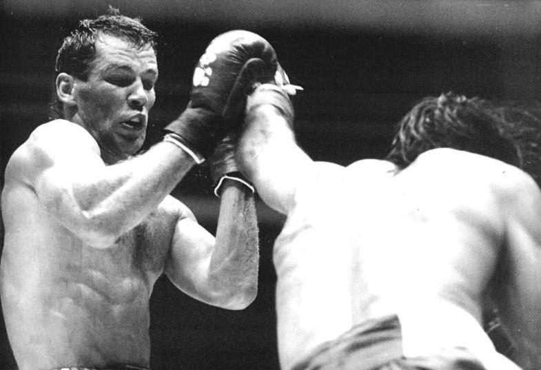 Boxkampf Henry Maske, Jorge Jose Salgado ADN-Bernd Settnik 8.9.90 Berlin (West): Boxen-Der Frankfurter Olympiasieger und Amateur-Weltmeister Henry Maske gewann am Freitag [7.9.] in der Sporthalle Charlottenburg auch seinen dritten Profi-Wettkampf souverän. Gegen den 35jährigen Argentinier Jorge Jose Salgado kam der Neu-Profi zueinem Punktsieg in dem auf sechs Runden angesetzten Kampf. Abgebildete Personen: Maske, Henry: Boxsportler, Olympiateilnehmer 1988, DDR (GND 119239302)